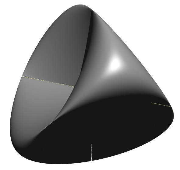 Steiner's Roman Surface